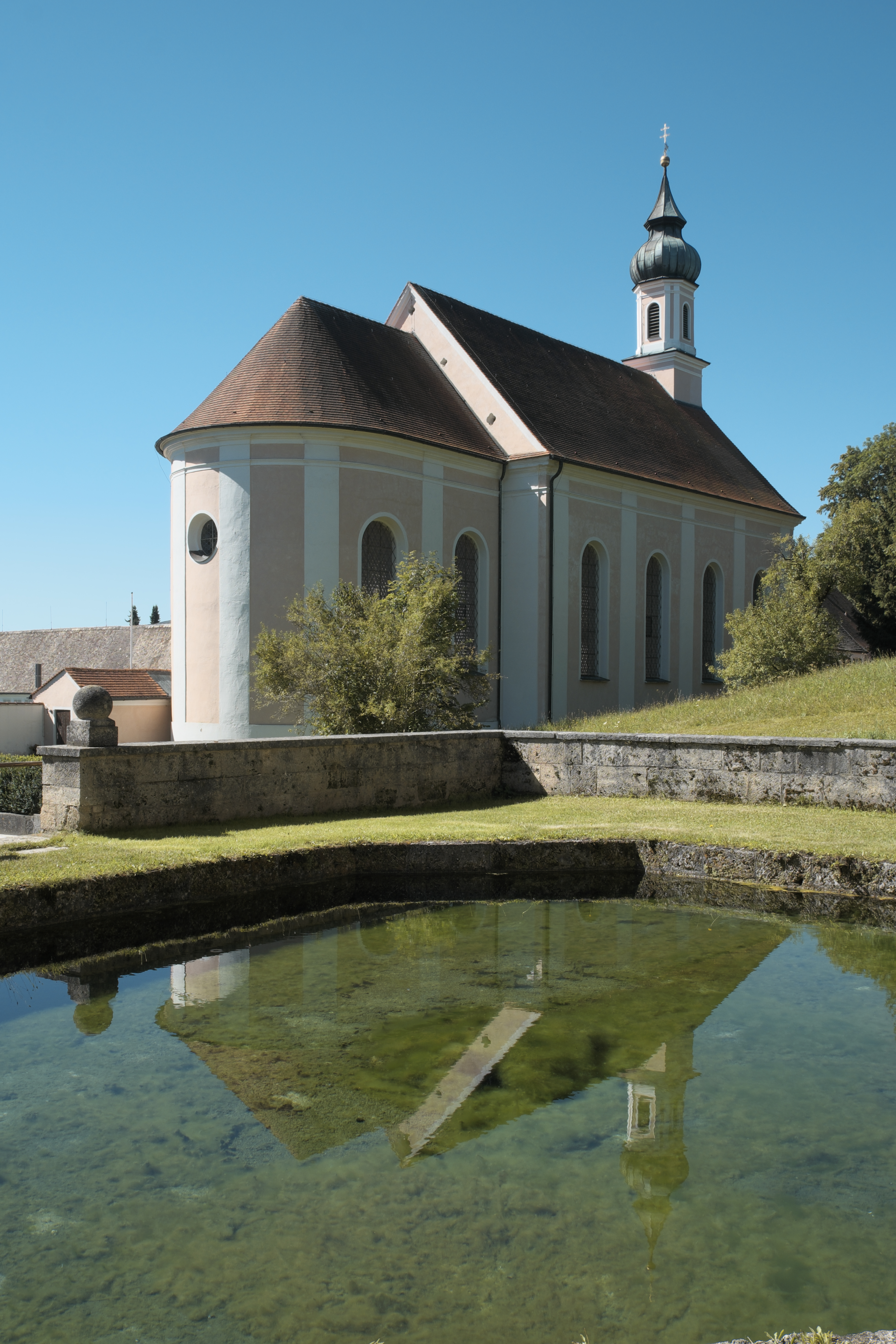 Katholische Pfarrkirche St. Johannes Baptist in Wessobrunn im Landkreis Weilheim-Schongau (Bayern/Deutschland)